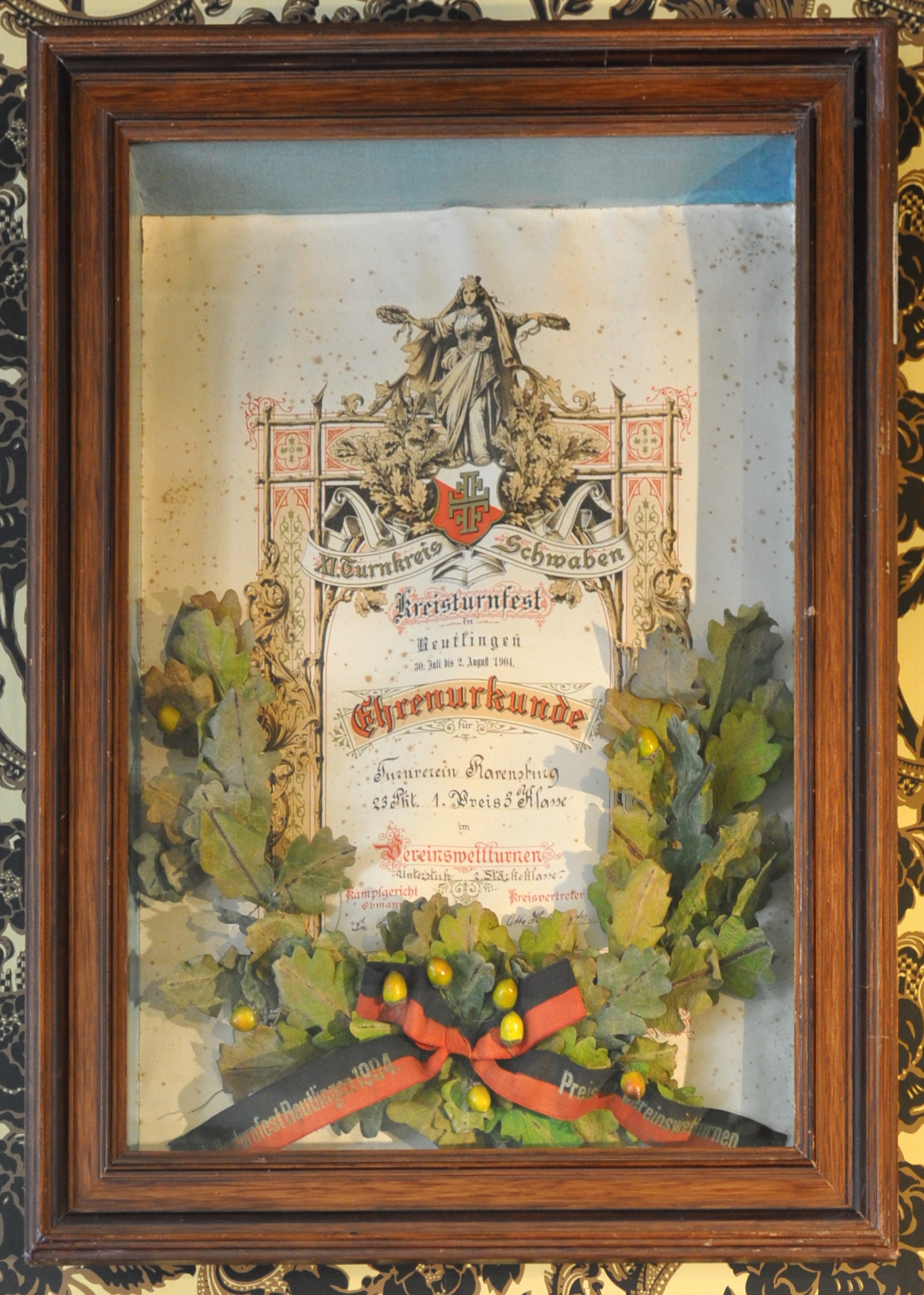 Ehrenurkunde für den Turnverein Ravensburg beim Turnfest in Reutlingen 1904; Museum Humpis-Quartier (Ravensburg) Humpis-Quartier Native nameMuseum Humpis-QuartierLocationRavensburg, GermanyCoordinates47° 46′ 49.8″ N, 9° 36′ 57.24″ E Established2009Web page control : Q1637298 VIAF: 128828875 LCCN: nb2007020847 GND: 4565586-8 WorldCat institution QS:P195,Q1637298